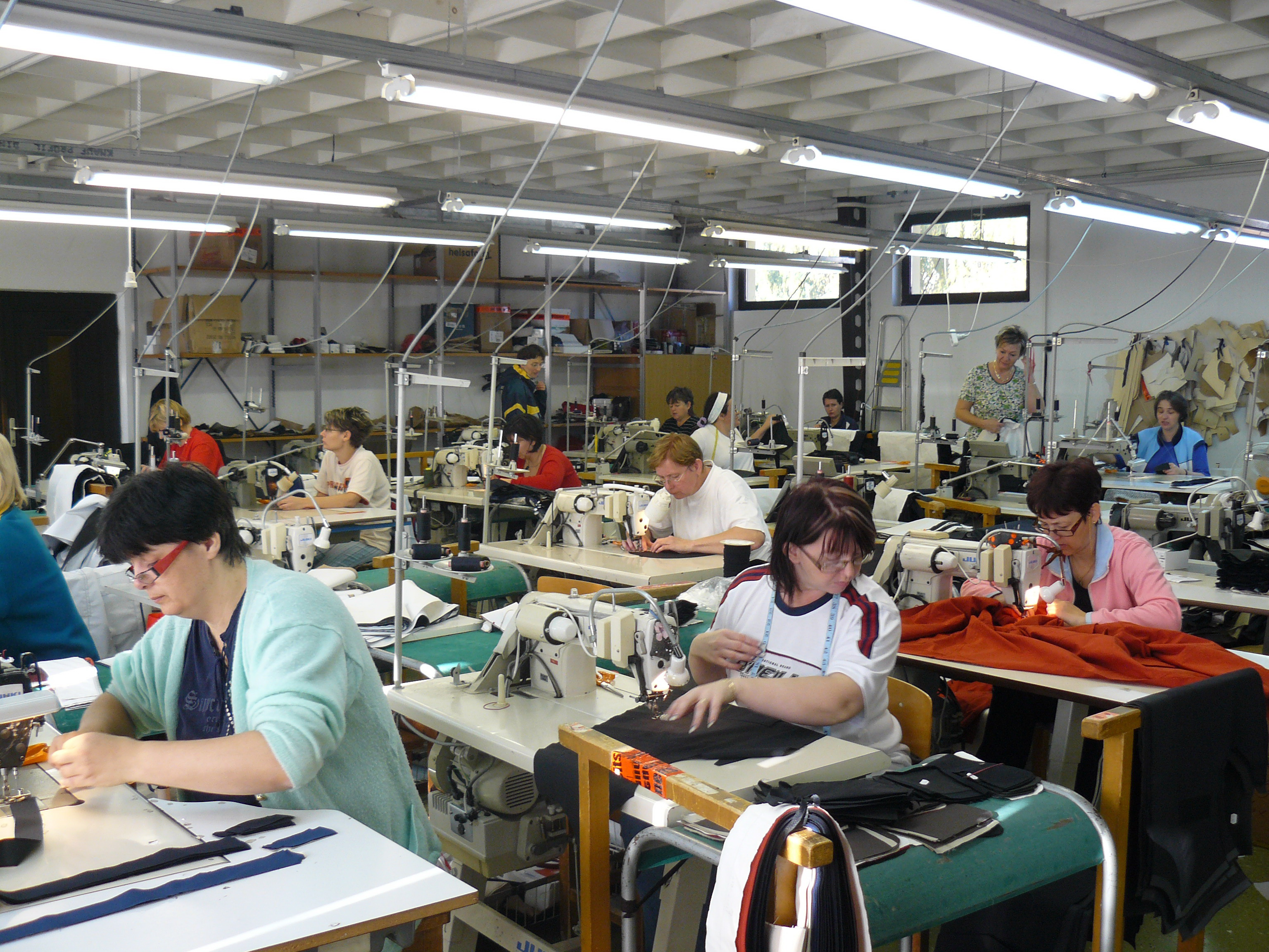 Magyarországi varroda 2010-ben